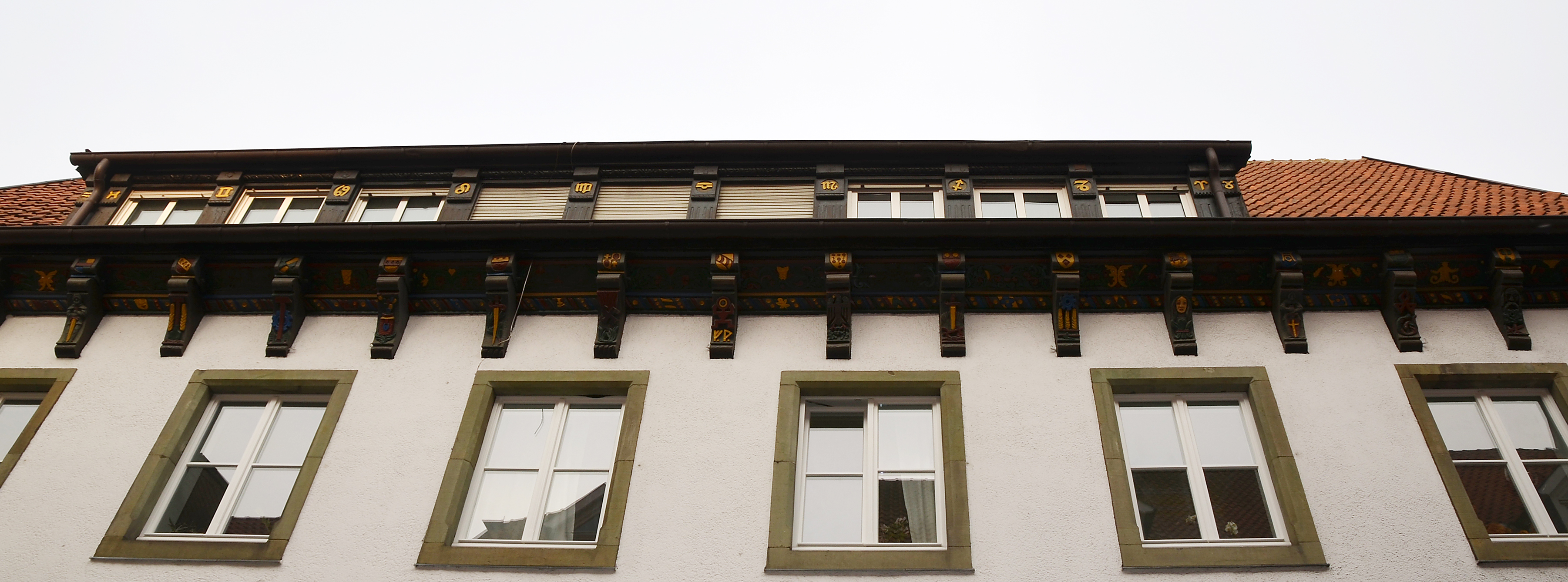 Soest, Germany, Marktstraße 7, Dachträger, Detaiansicht (1). Balkenfries aus Eichenholz einer abgerissenen Brücke bei Herzfeld. Ausgestaltung erfolgte durch Fritz Viegener. Die Straßenseite des Gebäudes enthält 32 Konsolen.